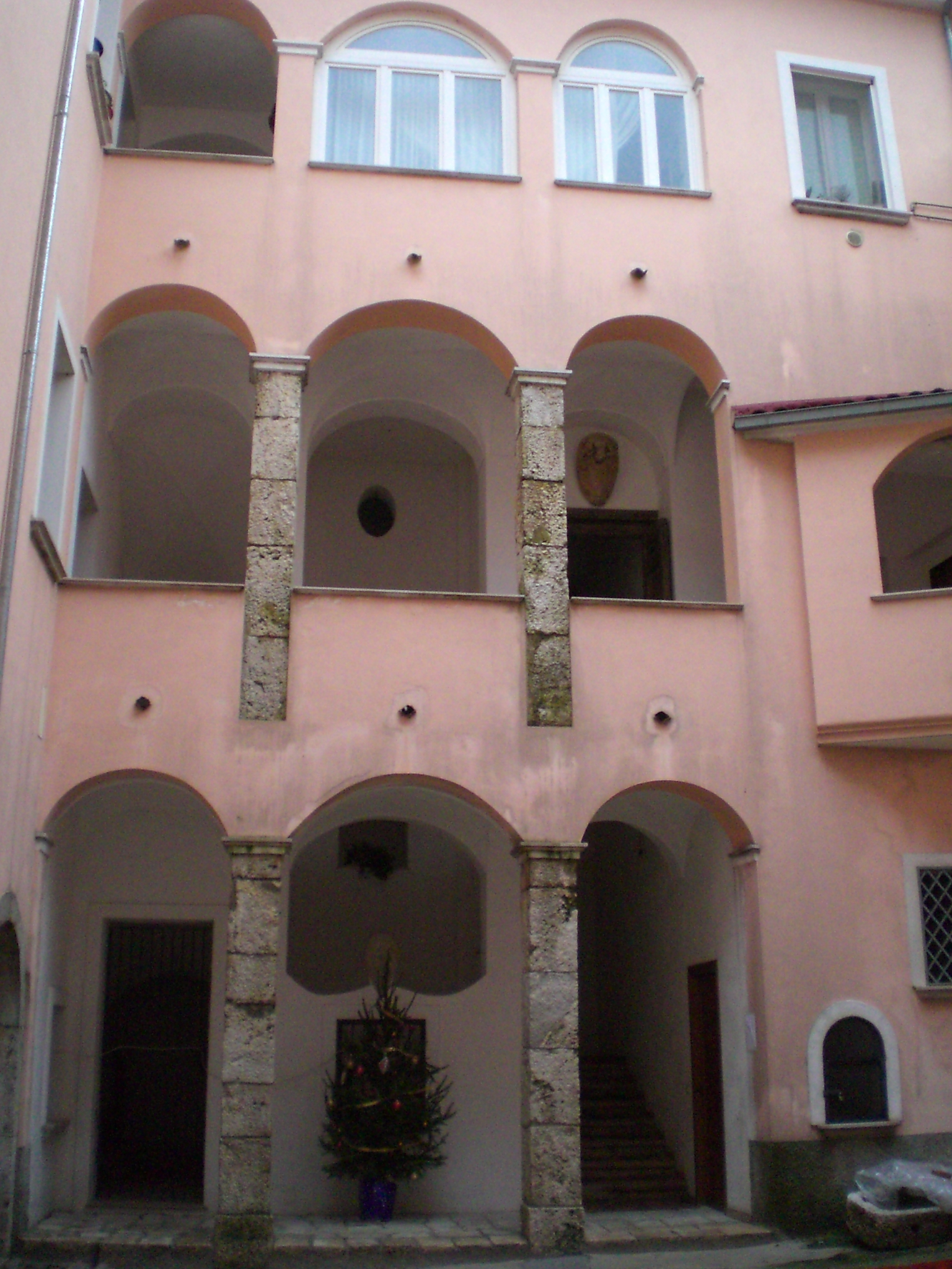 Cortile interno del Palazzo Rivelli sito a Campagna